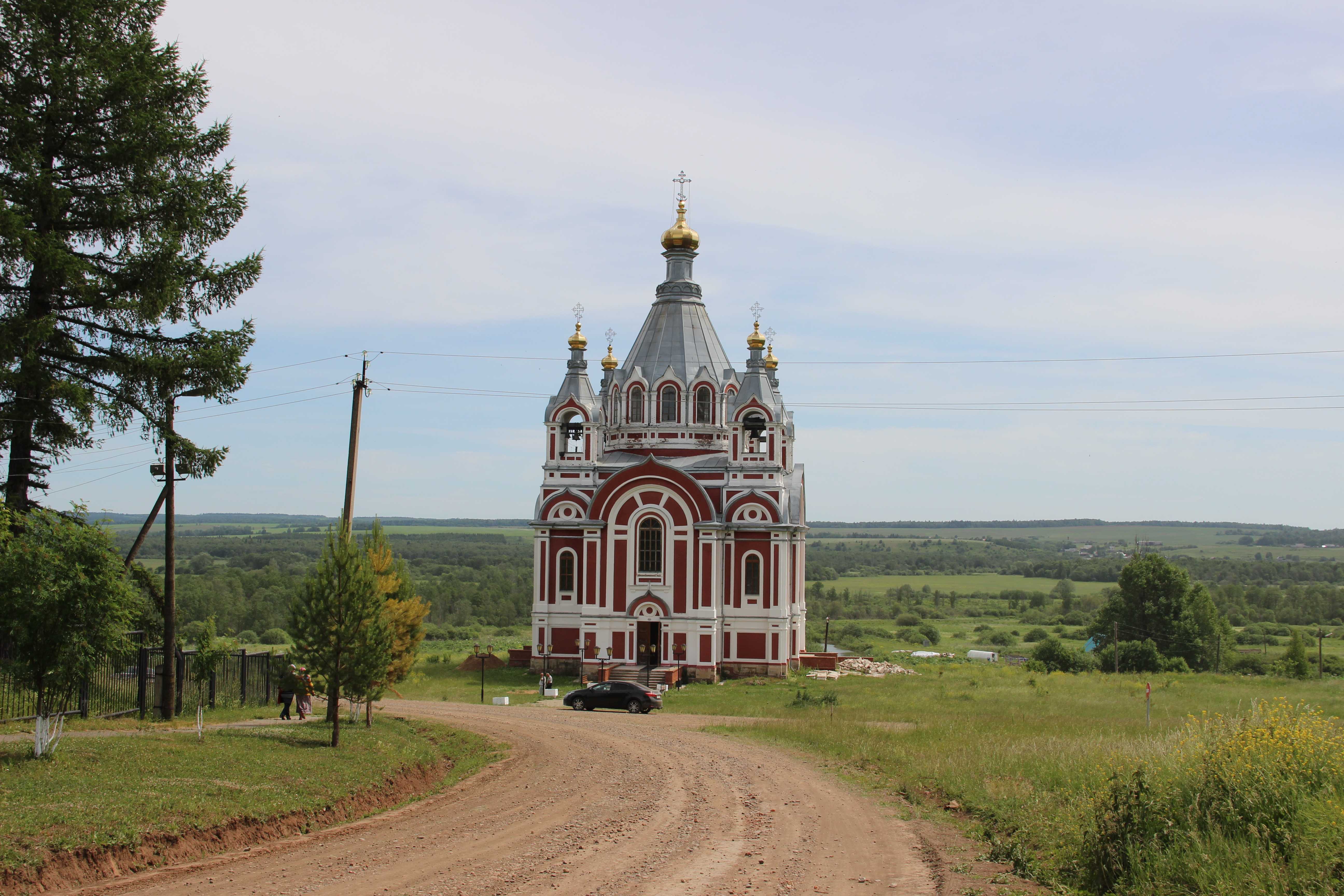 Свято-Никольский храм 1860 года, Свято-Никольский женский монастырь, село Николаевск, Чернушинский район, Пермский край.